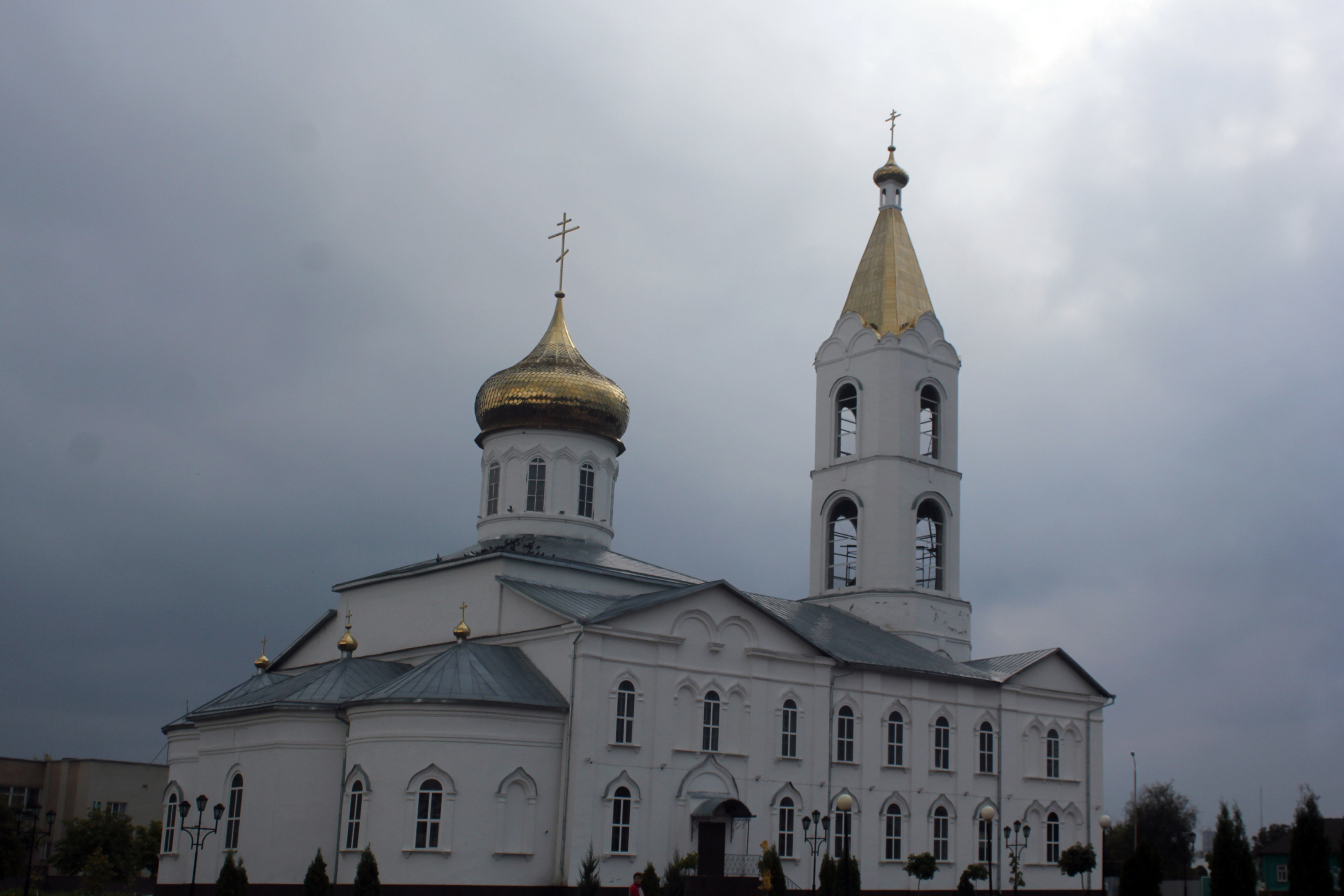 Свято-Троицкий храм